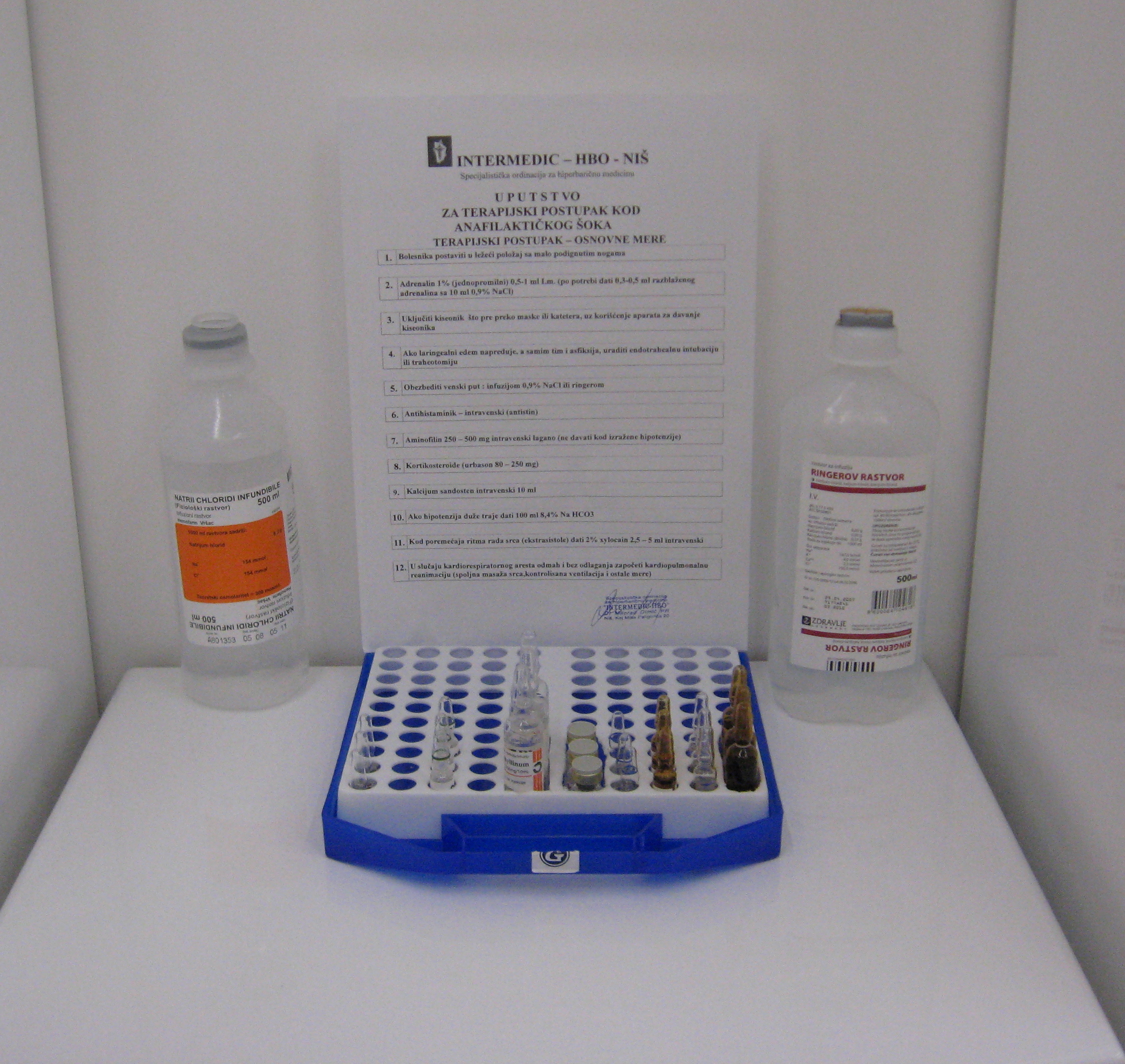 Komplet lekova koji se primenjuje kod anafilaktičnog šoka u zdravstvenim ustanovama. Autor dr Milorad Dimić, Niš, 11.03.2009.